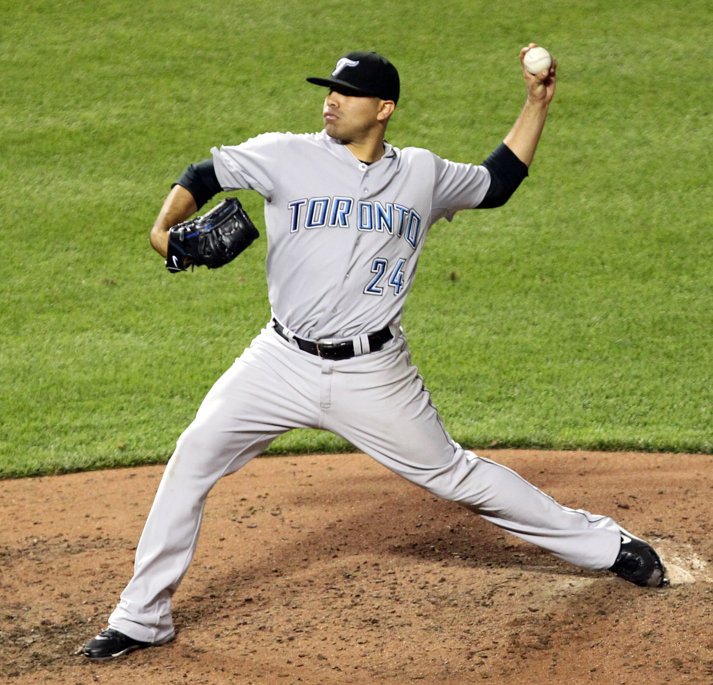 Ricky Romero